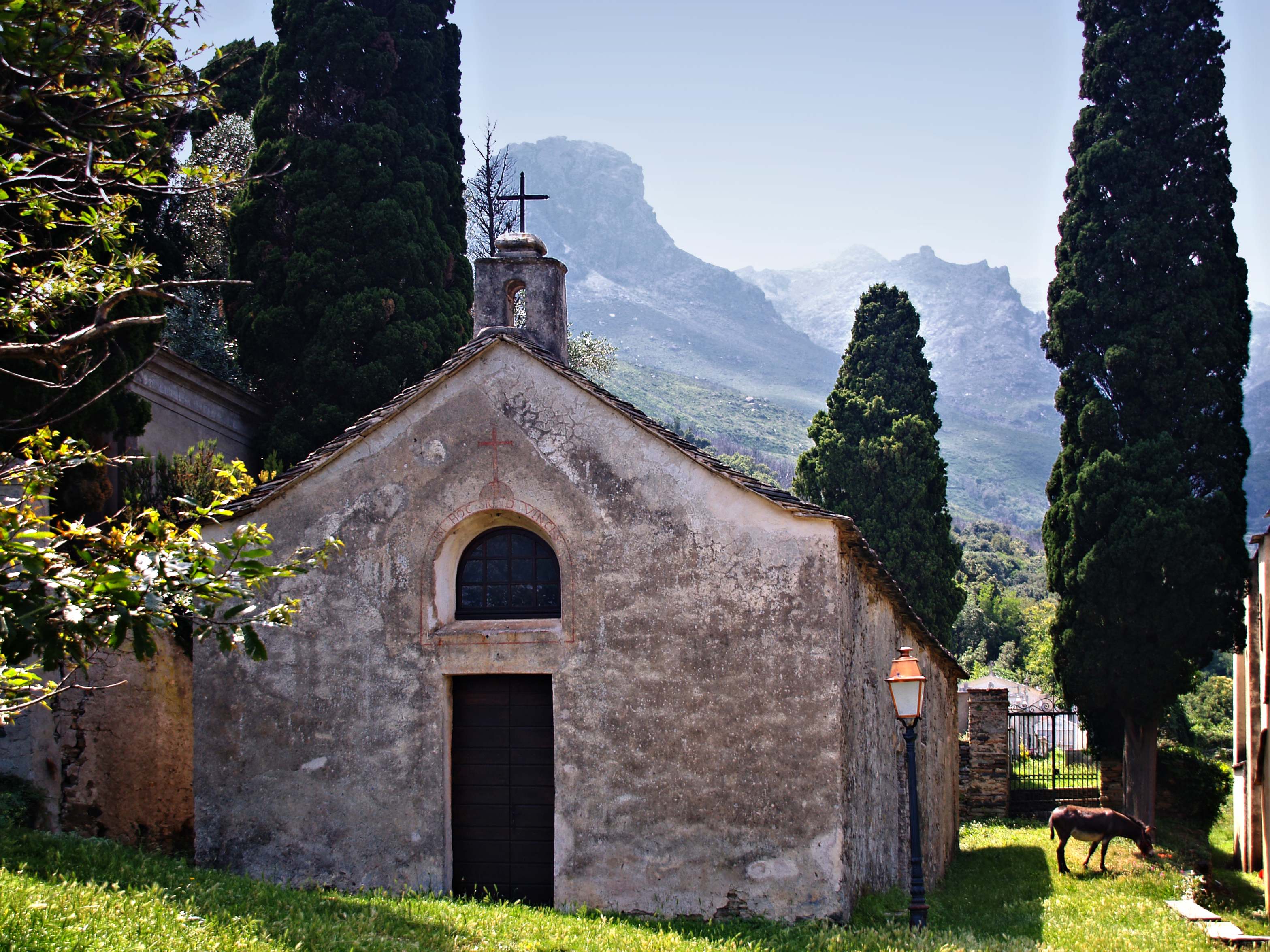 Corsu: Brandu, Capicorsu (Corsica) - Casazza Santa Croce di Silgaggia